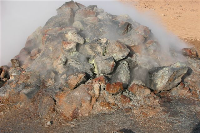 Hot Mud Spring at Namaskard